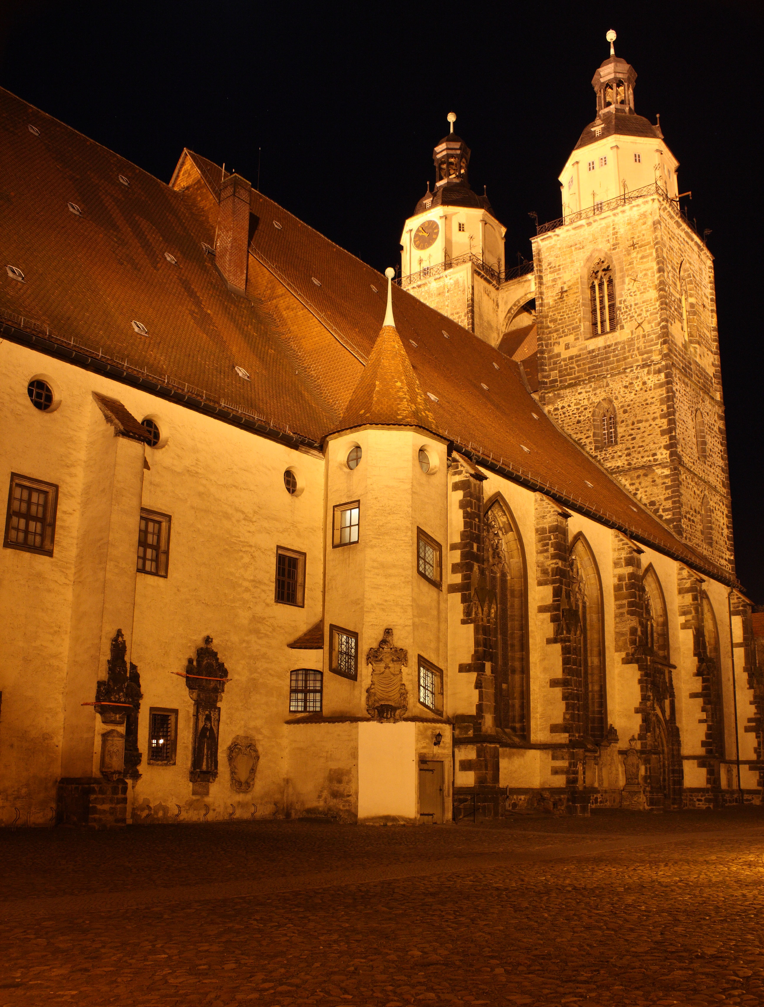 Stadtkirche St. Marien in Lutherstadt Wittenberg, Predigtkirche Marin Luthers, Cranach- Altar (Reformationsaltar), Reformation, Nord- Ost- Ansicht